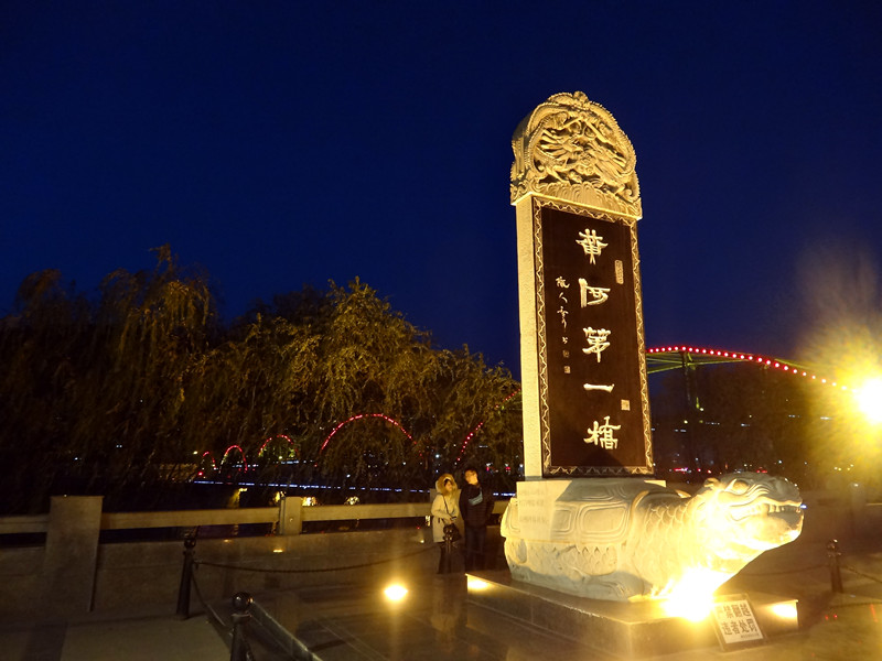 中山桥夜景